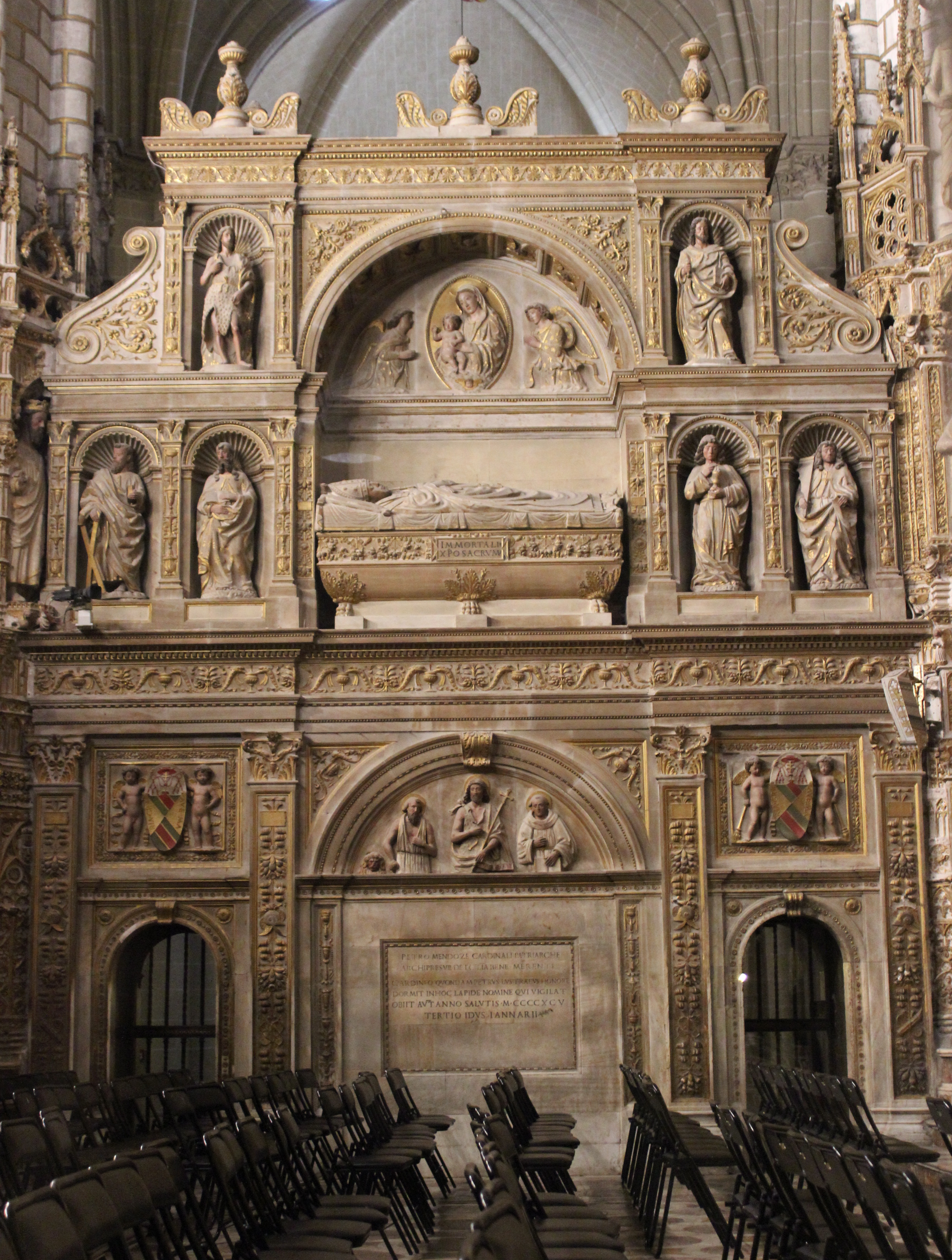 Sepulcro del cardenal Pedro González de Mendoza (1428-1495), que fue arzobispo de Toledo, en la capilla mayor de la catedral de Toledo, (España).